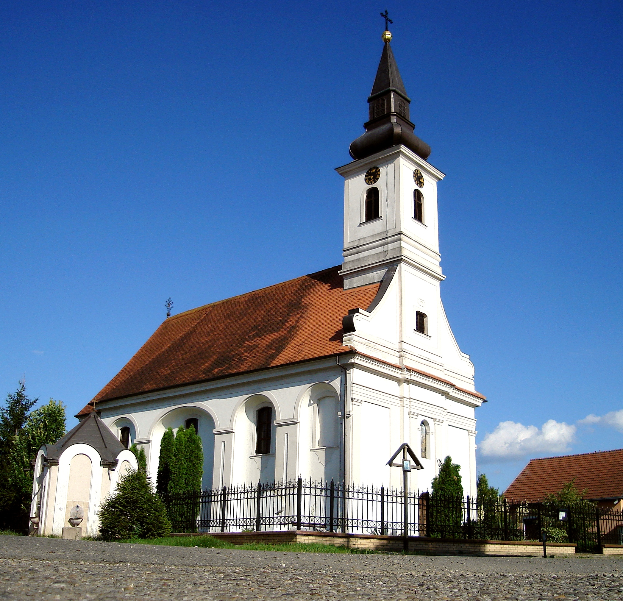 Српска православна црква у Раткову...